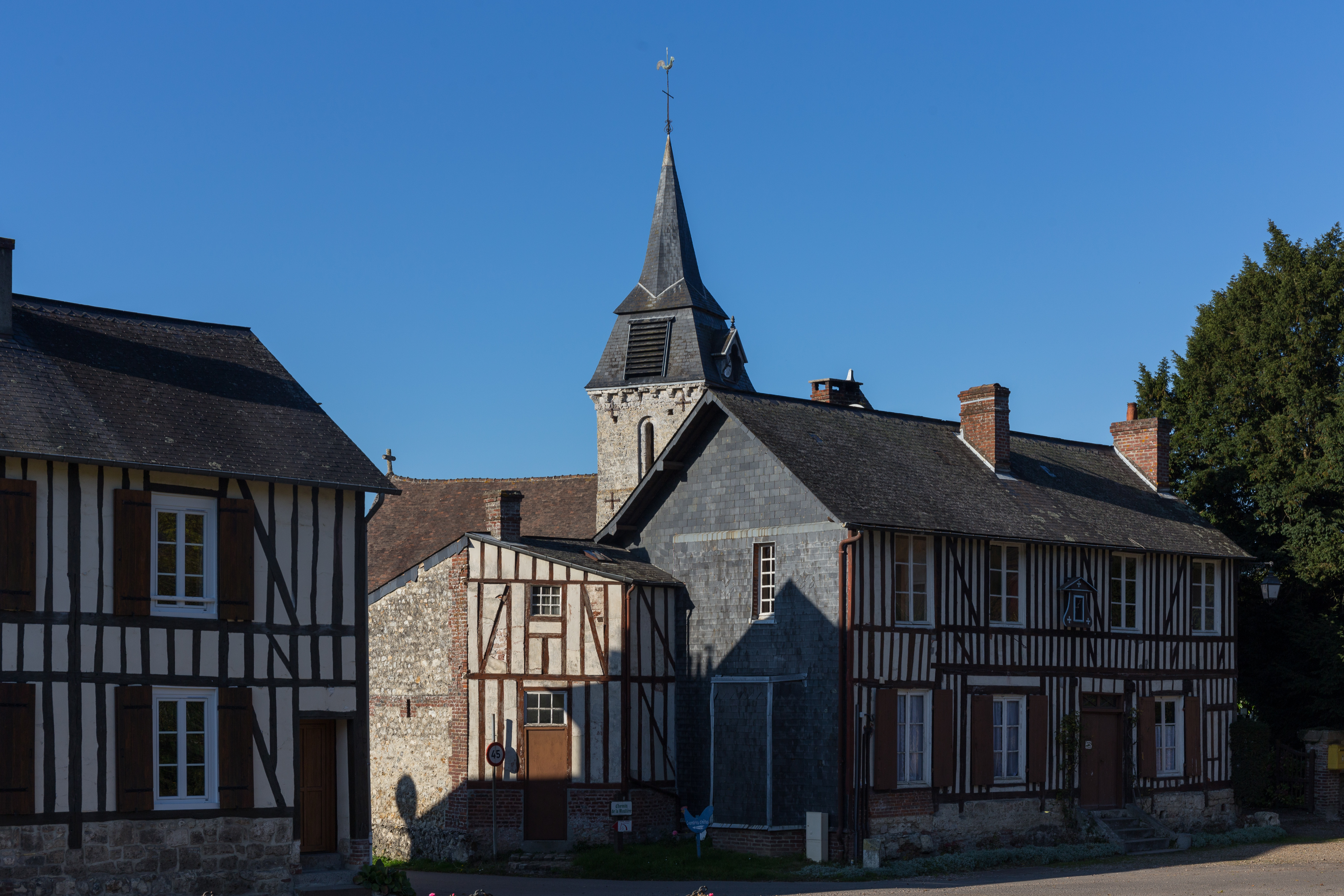 Centre-bourg de Barneville-la-Bertran